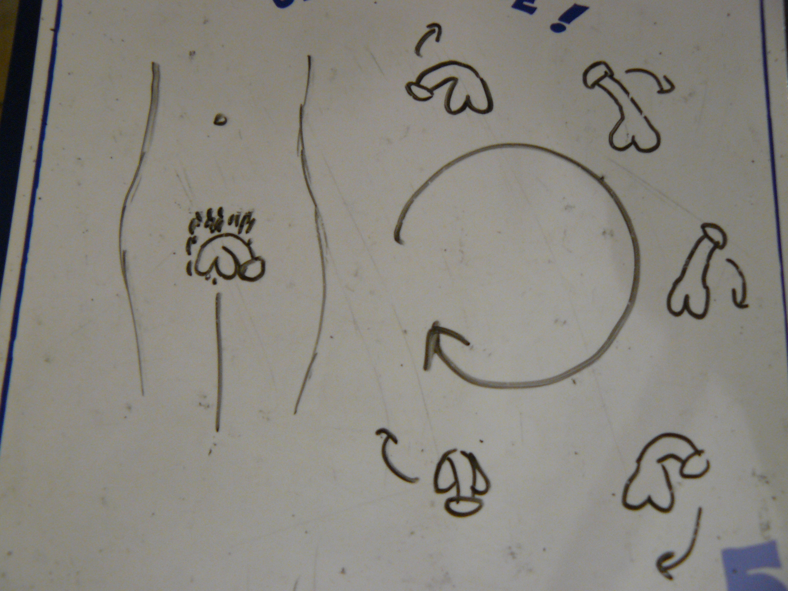 Dessin schématique de l’action de l’hélicobite.